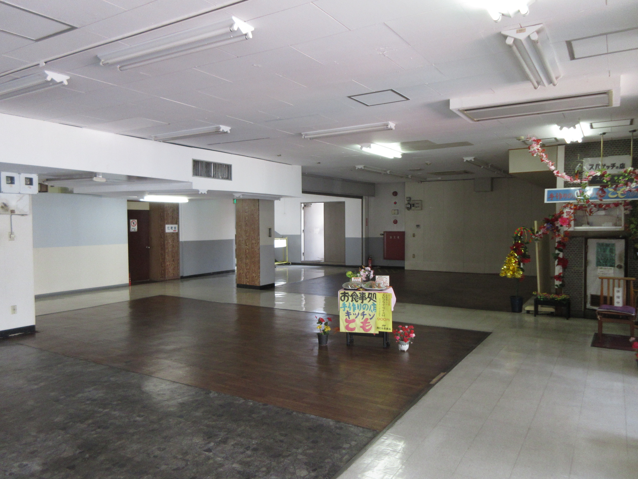 岡ビル百貨店の３階（岡崎市）